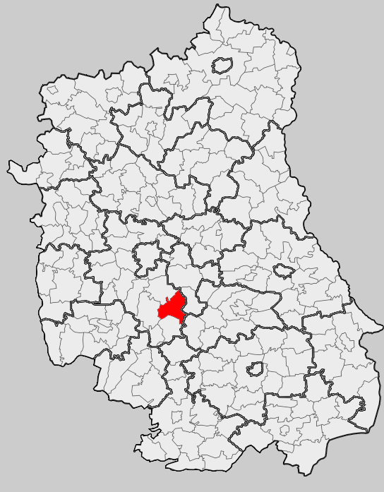 Map of gmina Krzczonów, Lublin county, Lublin voivodship Mapa gminy Krzczonów, powiat lubelski, województwo lubelskie